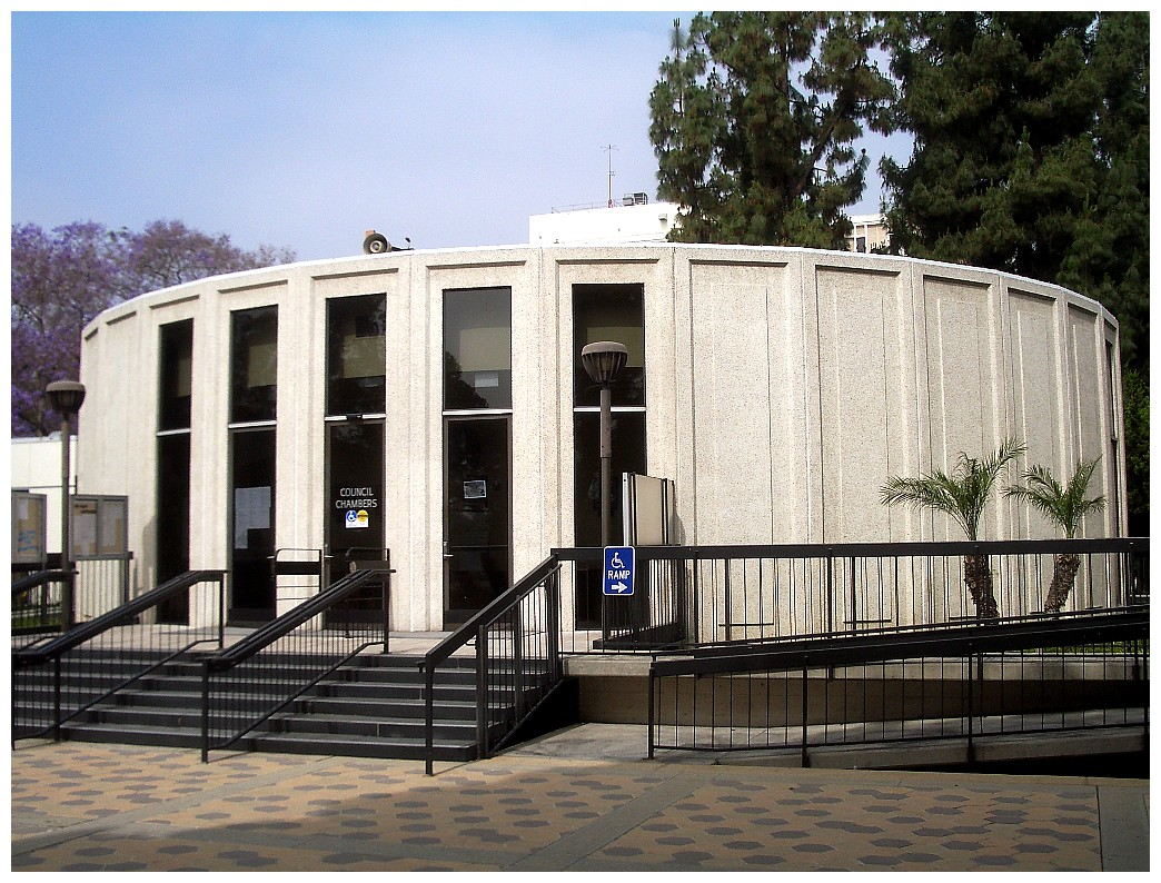 Pomona, CA